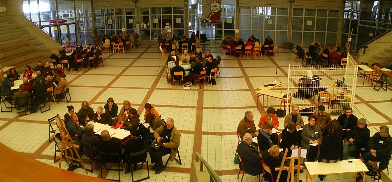 Le Forum du Lycée